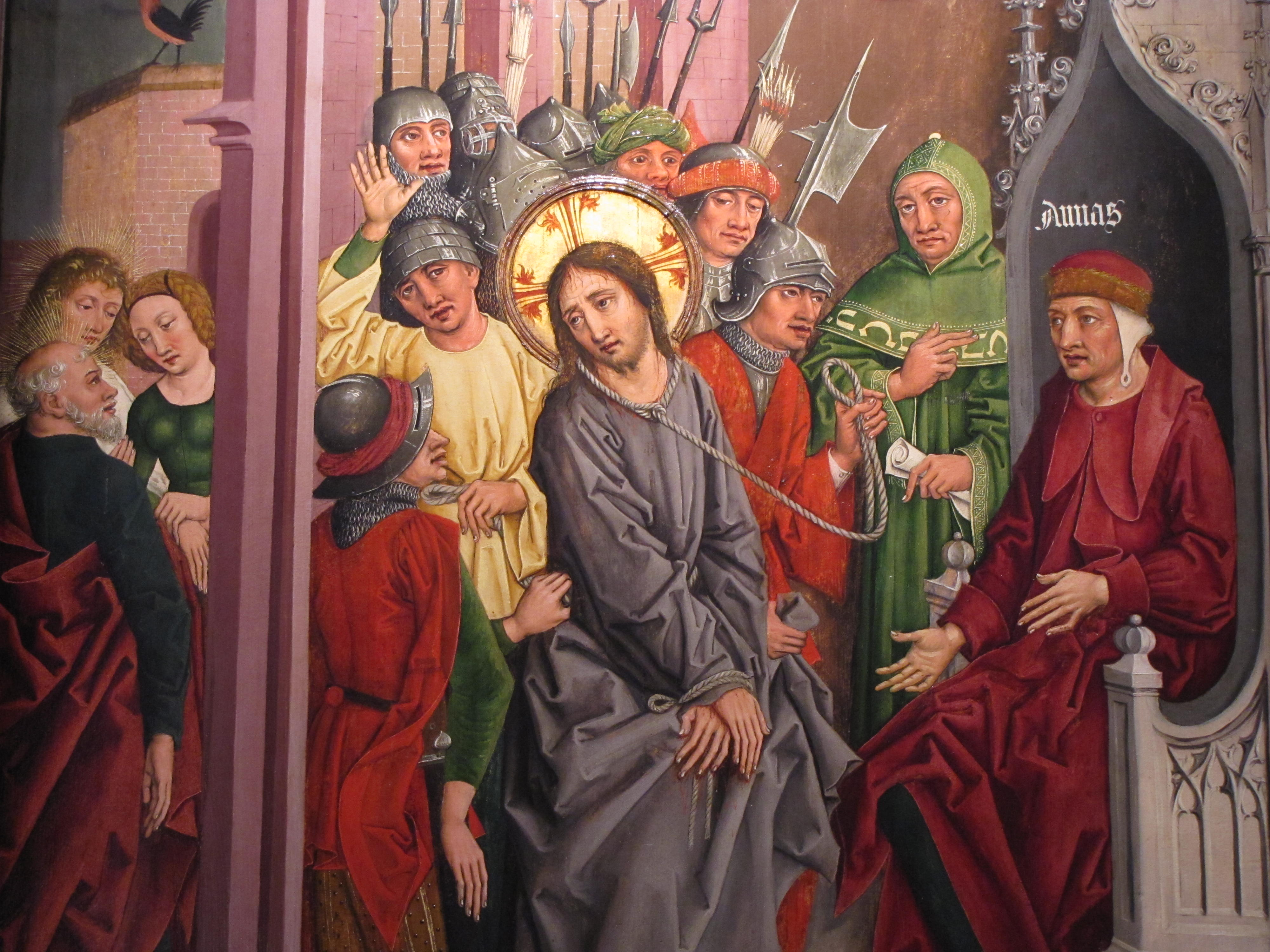 Le Christ devant Annas